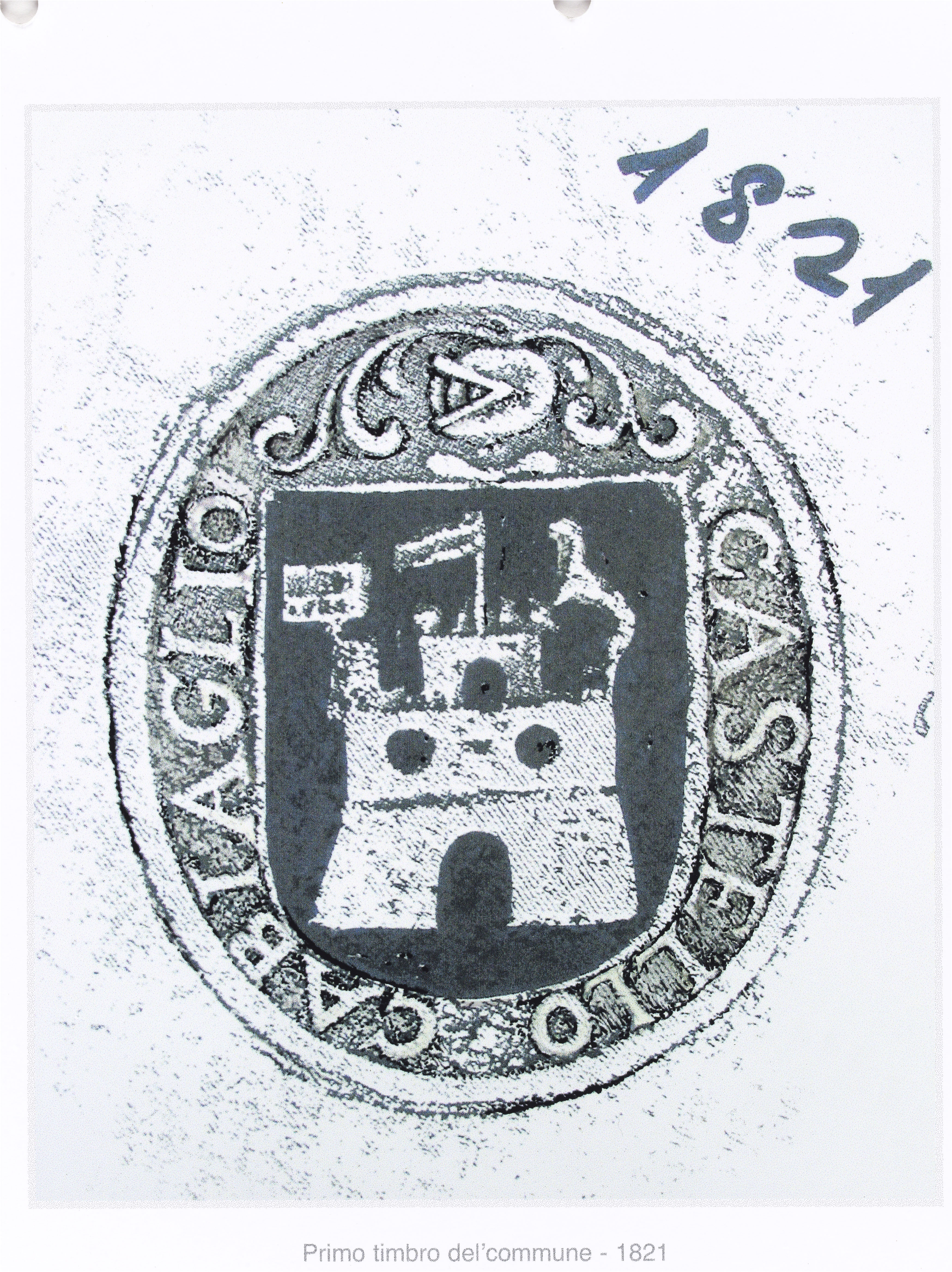 timbro della Comunità di Cabiaglio 1821